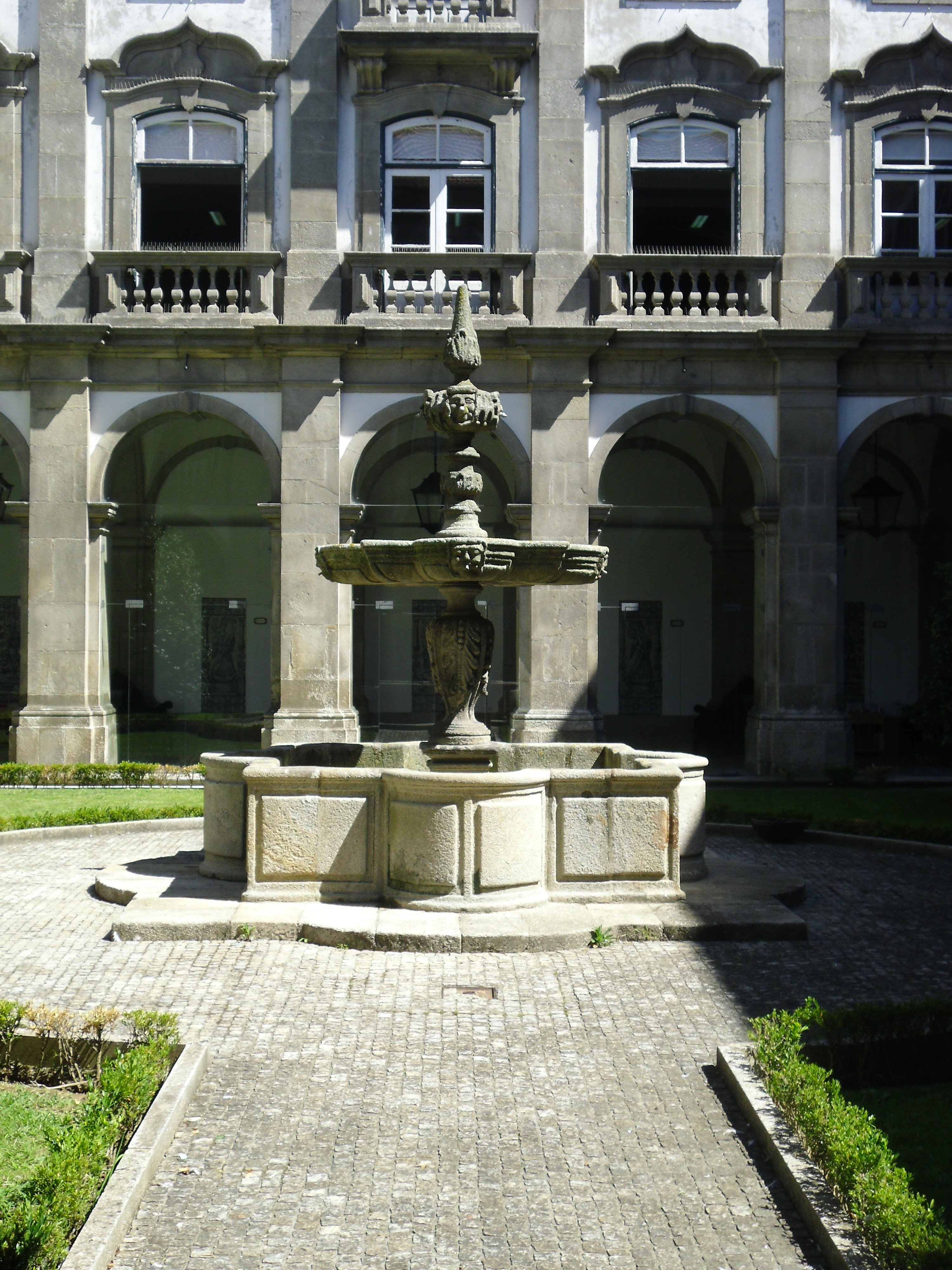 Fonte. Biblioteca publica municipal do Porto. Em Portuga, Porto, Porto, Santo Ildefonso This file was uploaded for Wiki Loves Monuments in Portugal with the unique identifier 73483.